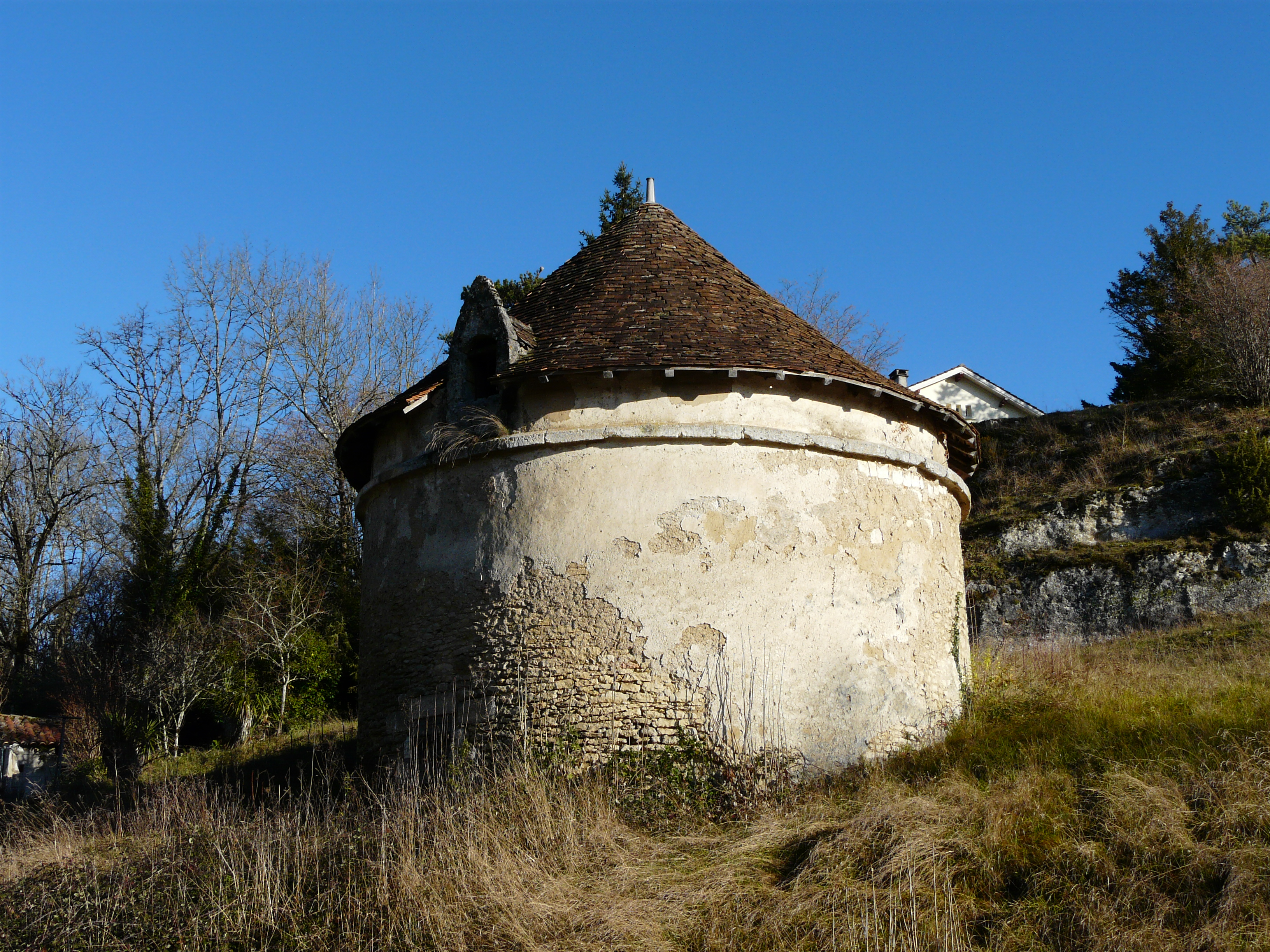 Situé à coté du pont sur la Côle, le pigeonnier du château de la Chapelle-Faucher, Dordogne, France